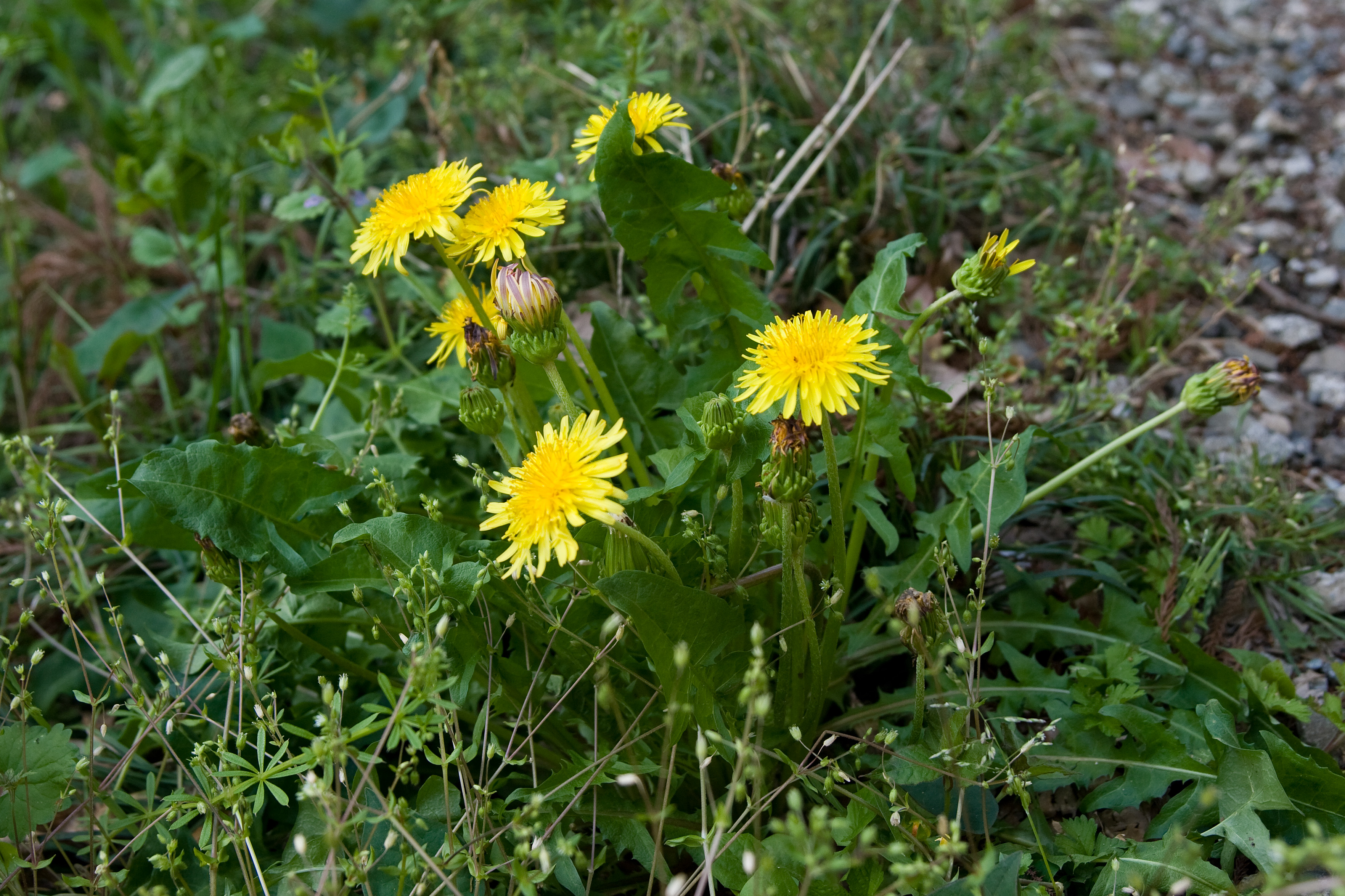 カントウタンポポ (学名:Taraxacum platycarpum)